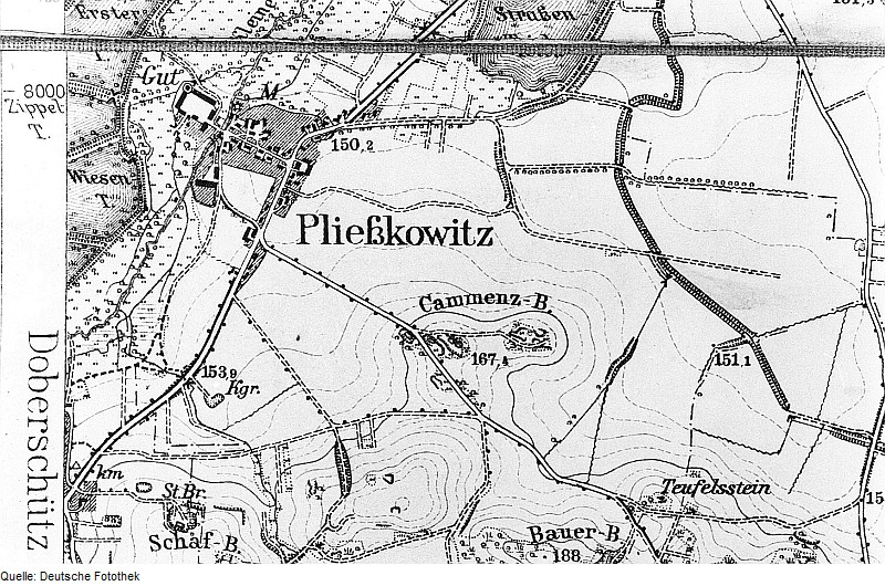 Original image description from the Deutsche Fotothek Malschwitz-Pließkowitz. Meßtischblatt, Sekt. Baruth-Weigersdorf